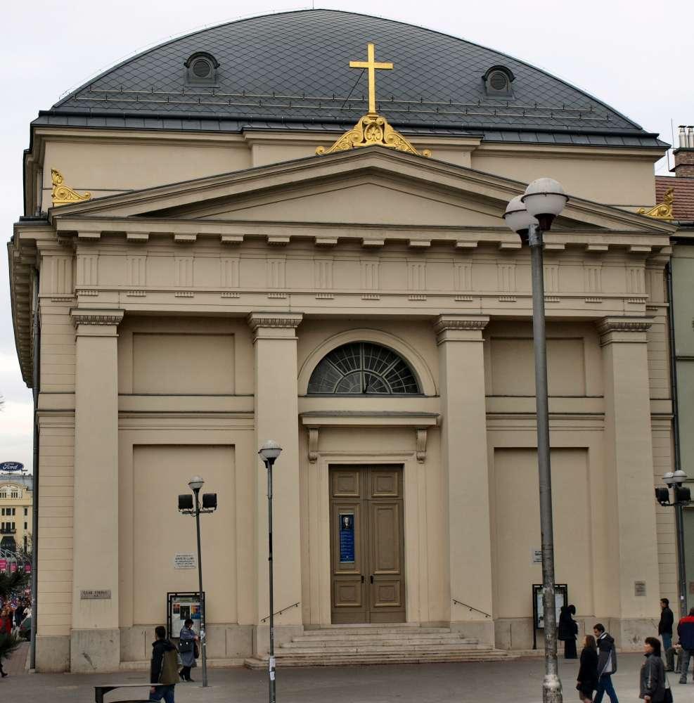 Deák téri evangélikus templom. Épült Pollack Mihály tervei szerint 1799-1808 között. Főhomlokzat: Hild József, 1836) This is a photo of a monument in Hungary, Identifier: 450